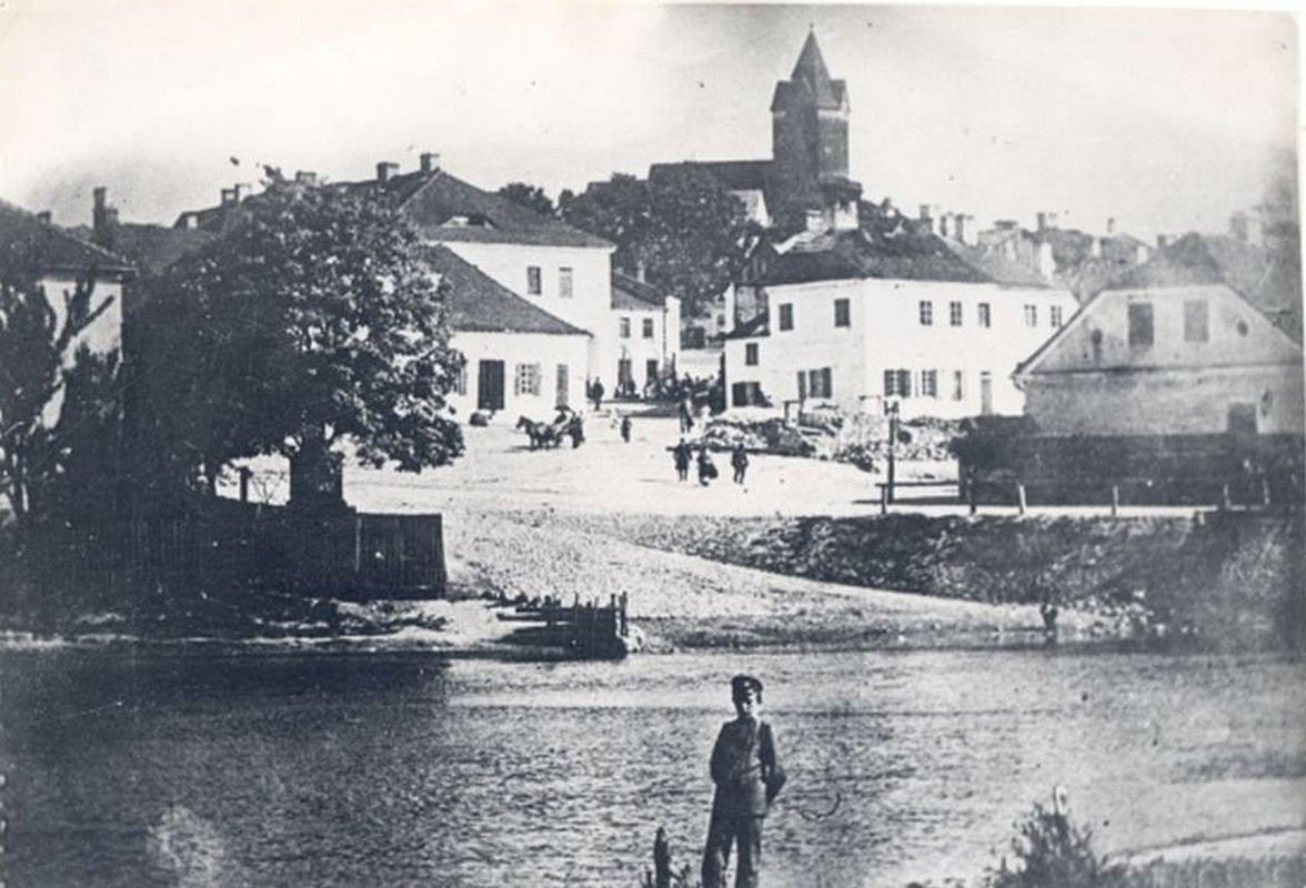 Widok miasta w przededniu I wojny światowej.